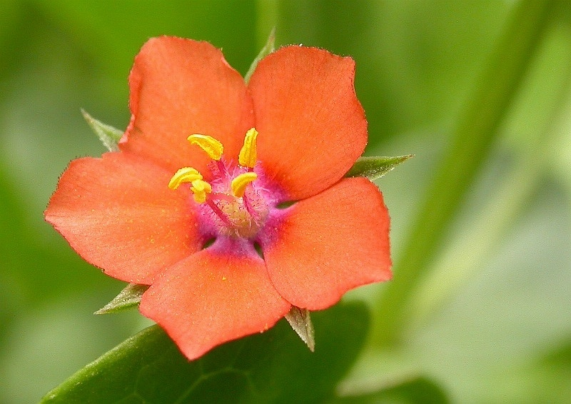 Anagallis arvensis, Gradignan, Gironde, France, 29 mai 2005